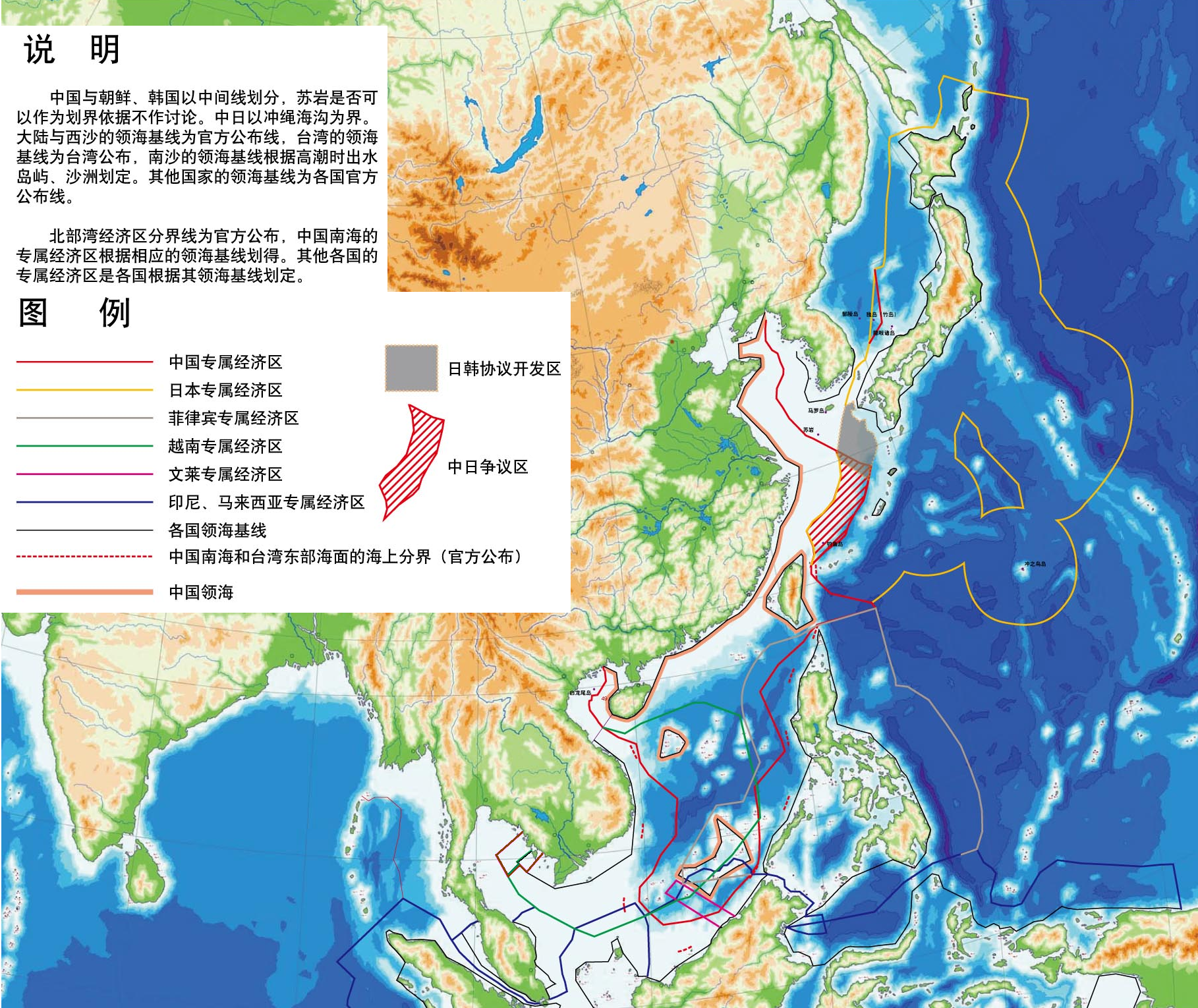 在不牵扯各国领陆、领空、底土纠纷，钓鱼台列岛、苏岩礁不作基点以及不谈台湾问题的前提下，标明： 【中华人民共和国】官方的大陆、西沙领海基线、专属经济区界线，中越官方的北部湾领海基线、专属经济区界线，南沙领海基线、专属经济区界线根据高潮时露水岛礁、沙洲划得，东海海域专属经济区中日纠纷中方以冲绳海沟划分的主张，中方地图中在南海诸岛和台湾岛以东通常标示的粗略段线（一般用来粗略地说明段线圈围内的所有岛屿主权归中方，但并没有法律意义）； 【中华民国（台湾）】官方的台湾及附属岛屿、东沙领海基线、专属经济区界线，东海海域专属经济区台日纠纷台方以冲绳海沟划分的主张，台方地图中在南海诸岛和台湾岛以东通常标示的粗略段线（一般用来粗略地说明段线圈围内的所有岛屿主权归台方，但并没有法律意义）； 【越南社会主义共和国】官方的北部湾经济区以外的领海基线、专属经济区界线（包括与柬埔寨王国在富国岛附近海域的经济专属区纠纷，东海（越南）海域上越南与印尼专属经济区纠纷越南方面的主张）； 【柬埔寨王国】官方的专属经济区界线； 【日本国】官方的领海基线、专属经济区界线（包括北方四岛日俄纠纷日方的主张与竹岛日韩纠纷日方的主张），日韩官方签订的日韩协议开发区界线，东中国海海域专属经济区日中纠纷日方以中间线划分的主张； 【大韩民国】官方的除东海（韩国）海域以外的领海基线，中韩专属经济区界线则以中间线划定，离於岛不算作基点，东海海域专属经济区界线标出韩日争议区韩方主张以独岛作为基点的方案，韩日官方签订的韩日协议开发区界线； 【朝鲜民主主义人民共和国】朝中专属经济区界线以中间线划定； 【菲律宾共和国】官方的领海基线、专属经济区界线（其中领海基线部分卡拉延镇不作基点）。*制图期间菲律宾国会正在研讨新的领海基线方案，可能会修改大陆架基点来延伸菲属经济区，批准后将于联合国所定的最后限期2009年5月13日前递交。本图仍采用先前的共和国5446号法令来标示菲律宾的领海基线，而共和国5446号法令并不与菲律宾签署的联合国海洋法公约兼容。新的方案请参考“参议院1467号提议”、“众议院3216号提议”与“格洛丽亚·马卡帕加尔·阿罗约总统提议”。菲方对马来西亚的婆罗洲北部地区的主张没有标示，亦没有标示菲马间的领海基线和菲马间菲方的专属经济区界线； 【文莱达鲁萨兰国】官方的专属经济区界线，没有标示文马纠纷文方主张的文莱领海基线； 【印度共和国】官方的印缅、印泰在孟加拉湾安达曼-尼科巴群岛的专属经济区界线； 【印度尼西亚共和国】官方的领海基线、专属经济区界线（包括南中国海海域上印尼与越南专属经济区纠纷印尼方面的主张）； 【马来西亚】官方的领海基线、专属经济区界线（包括双方在苏拉威西海/西里伯斯海上西巴坦岛、利吉丹岛、塞巴蒂克岛三岛的纠纷，*2002年12月17日，国际法院决议将西巴坦、利吉丹二岛划给马来西亚，将塞巴蒂克岛划归印度尼西亚。马文纠纷马方主张的领海基线及专属经济区界线。白礁马新纠纷马方主张）*国际法院于2008年5月23日发表最终的主权归属判决，决定新加坡拥有对白礁的主权，马来西亚拥有对中岩礁的主权，马、新双方应当在施行国际法院主权归属的决议后，再展开针对南礁主权归属的划分；